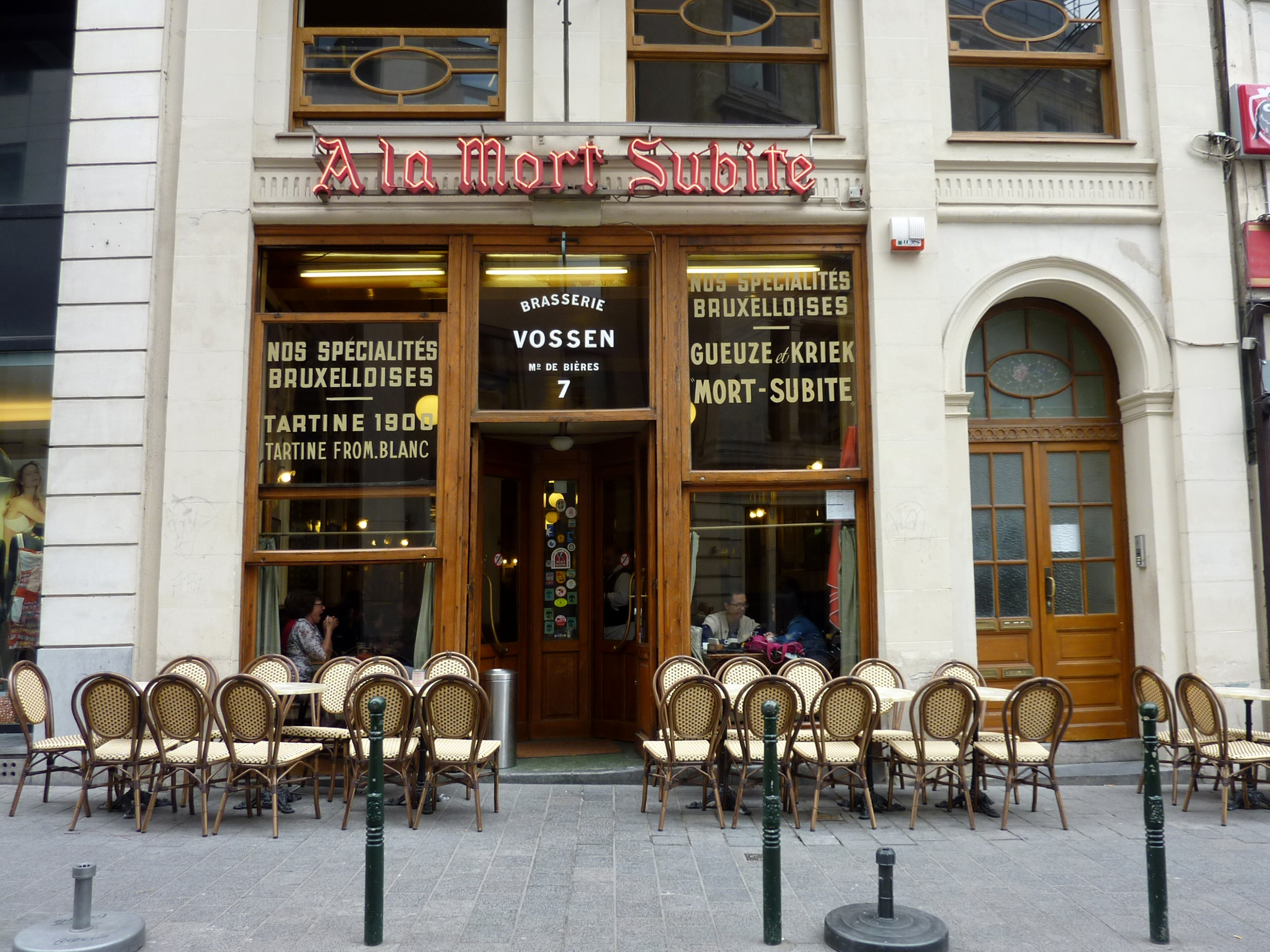 Café-bar À la Mort Subite Bruxelles